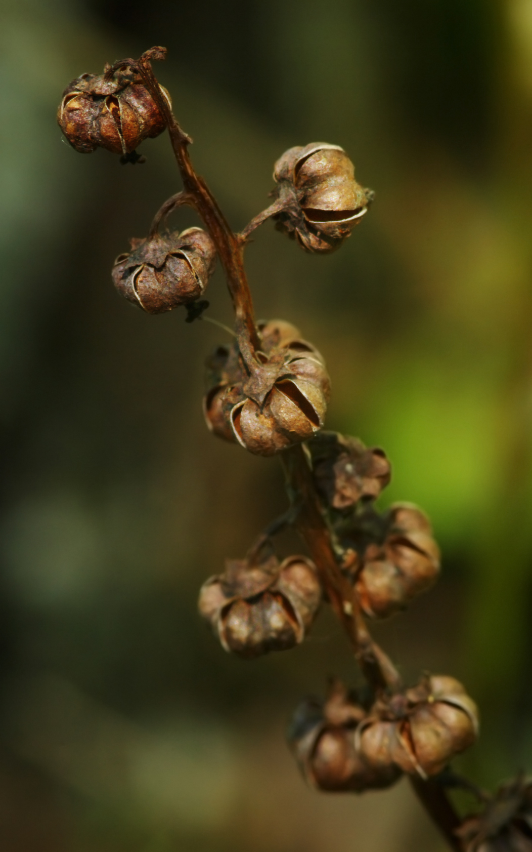 Gruszyczka mniejsza (Pyrola minor)